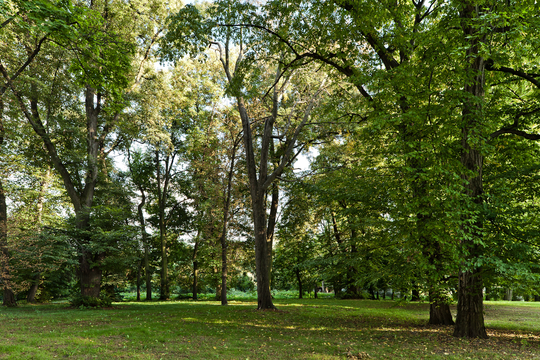 Dwór w Owczarach - park